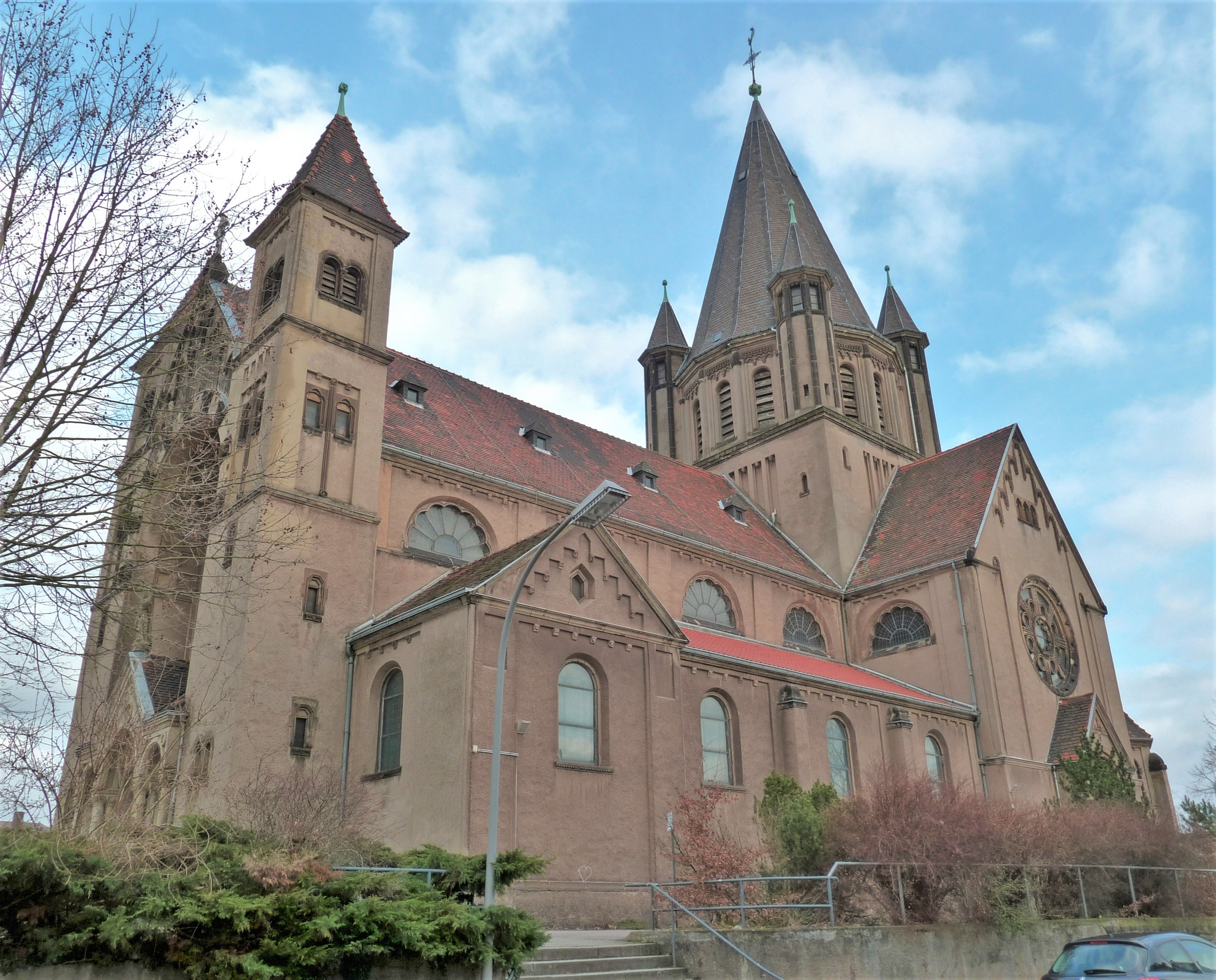 Die Herz-Jesu-Kirche im Saarbrücker Stadtteil Burbach.